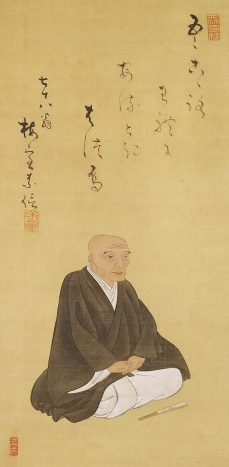 桜井梅室像。歌川広重画。東京国立博物館所蔵。